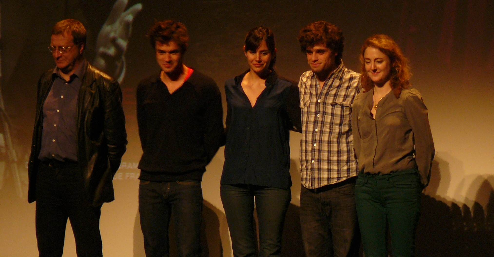 Jury du Court Métrage du festival international du film fantastique de Gérardmer